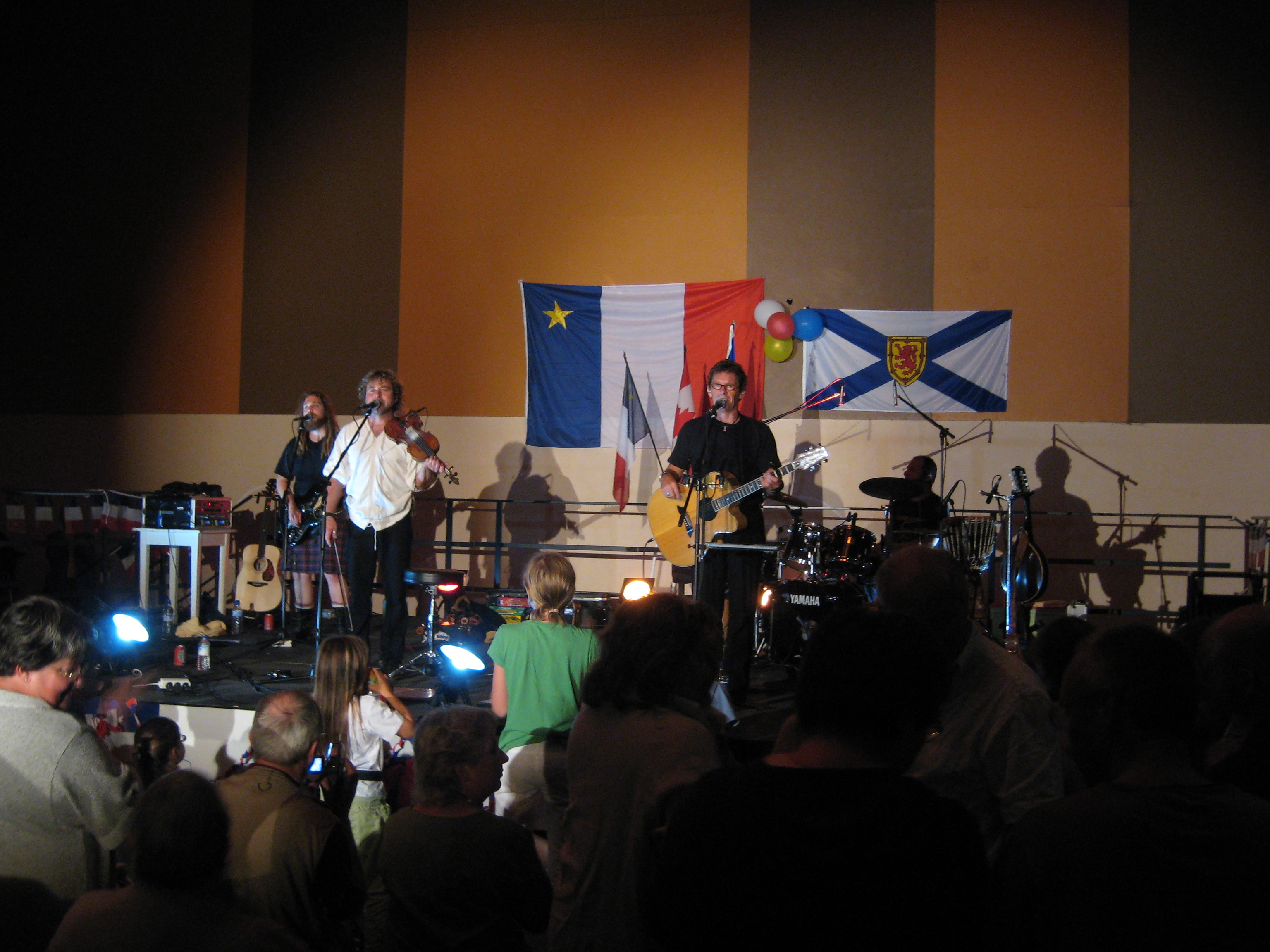 Groupe Sûroit lors d'un concert le 15 Août 2007 à Saint Aubin sur Mer, dans le cadre de la semaine acadienne.